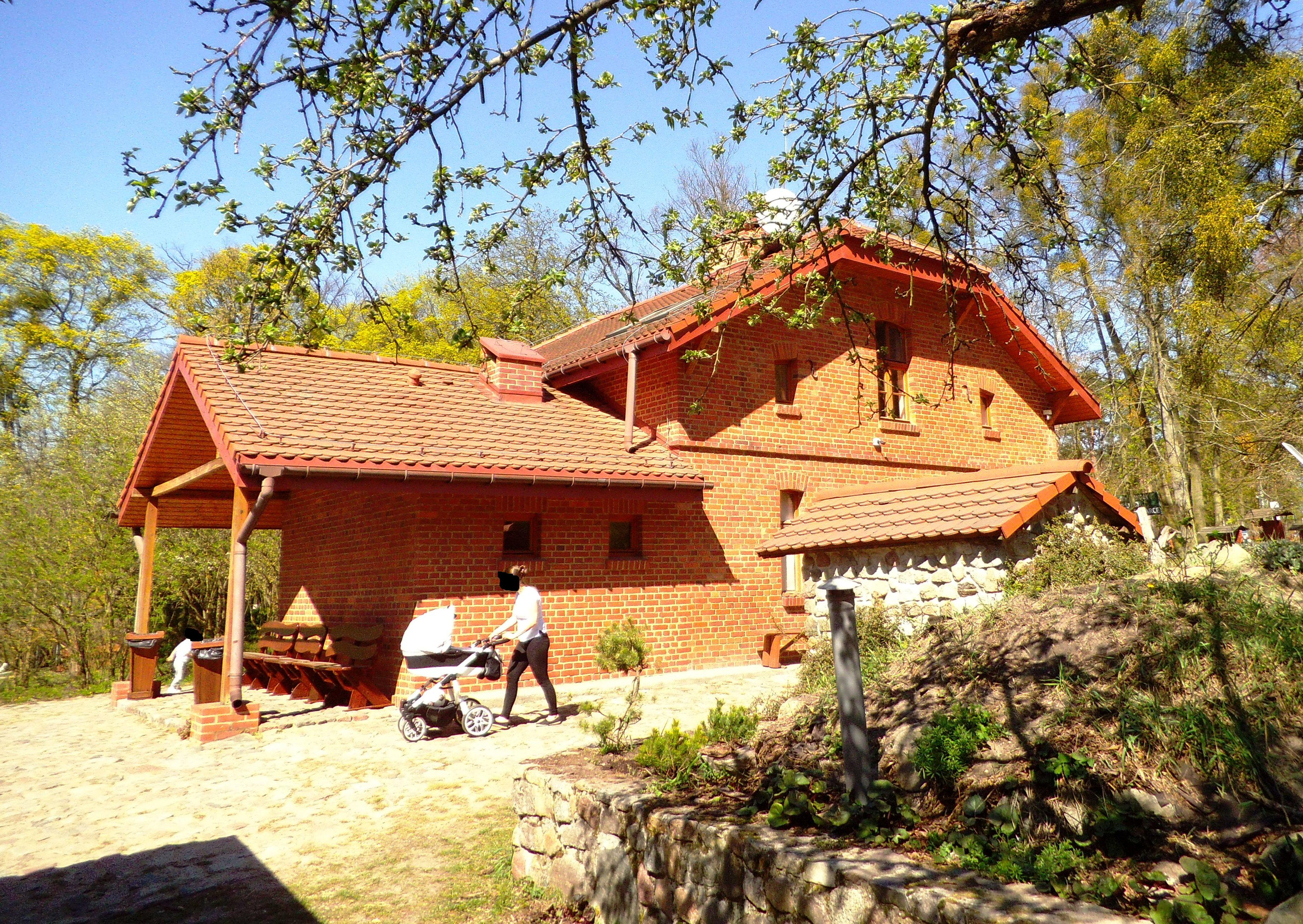 Budynek przy ul. Przysieckiej 13 w Toruniu